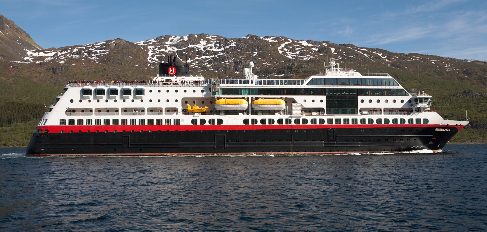 MS Midnatsol in Raftsund